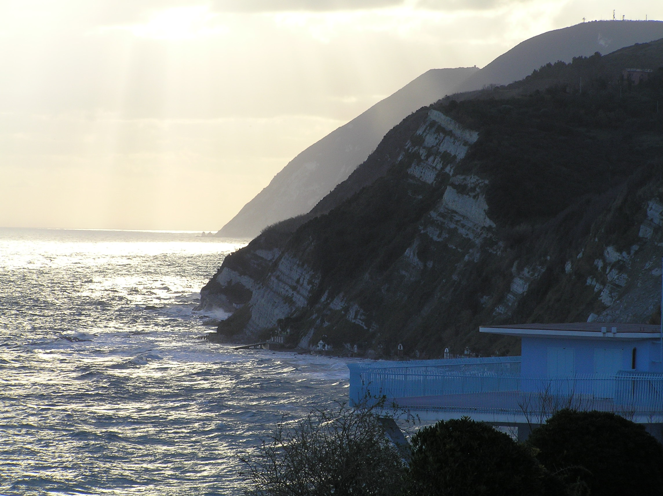 La foto è stata scattata da via Panoramica di Ancona e rappresenta la Punta di Pietralacroce e, dietro, Monte Conero con gli scogli delle Due Sorelle (Sirolo) che si intravedono in lontananza. In primo piano la terrazza dell'ascensore pubblico del Passetto, che conduce alla spiaggia sottostante. Tutti i luoghi rappresentati nella foto rientrano all'interno del Parco Regionale del Conero.